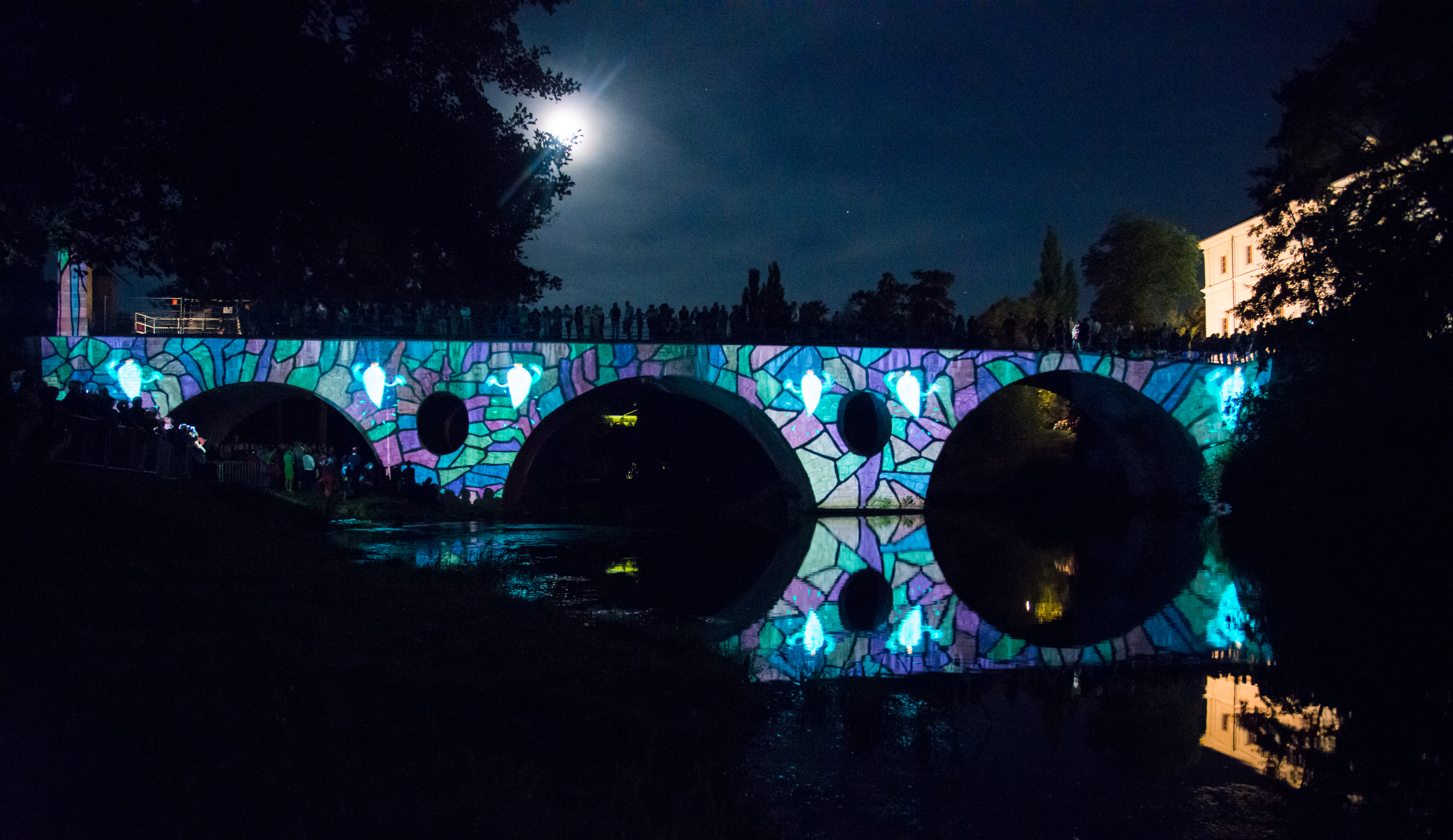 Videomapping "Sternbrücke" von OMAi, 2016 an der Sternbrücke Weimar. Foto: Henry Sowinski